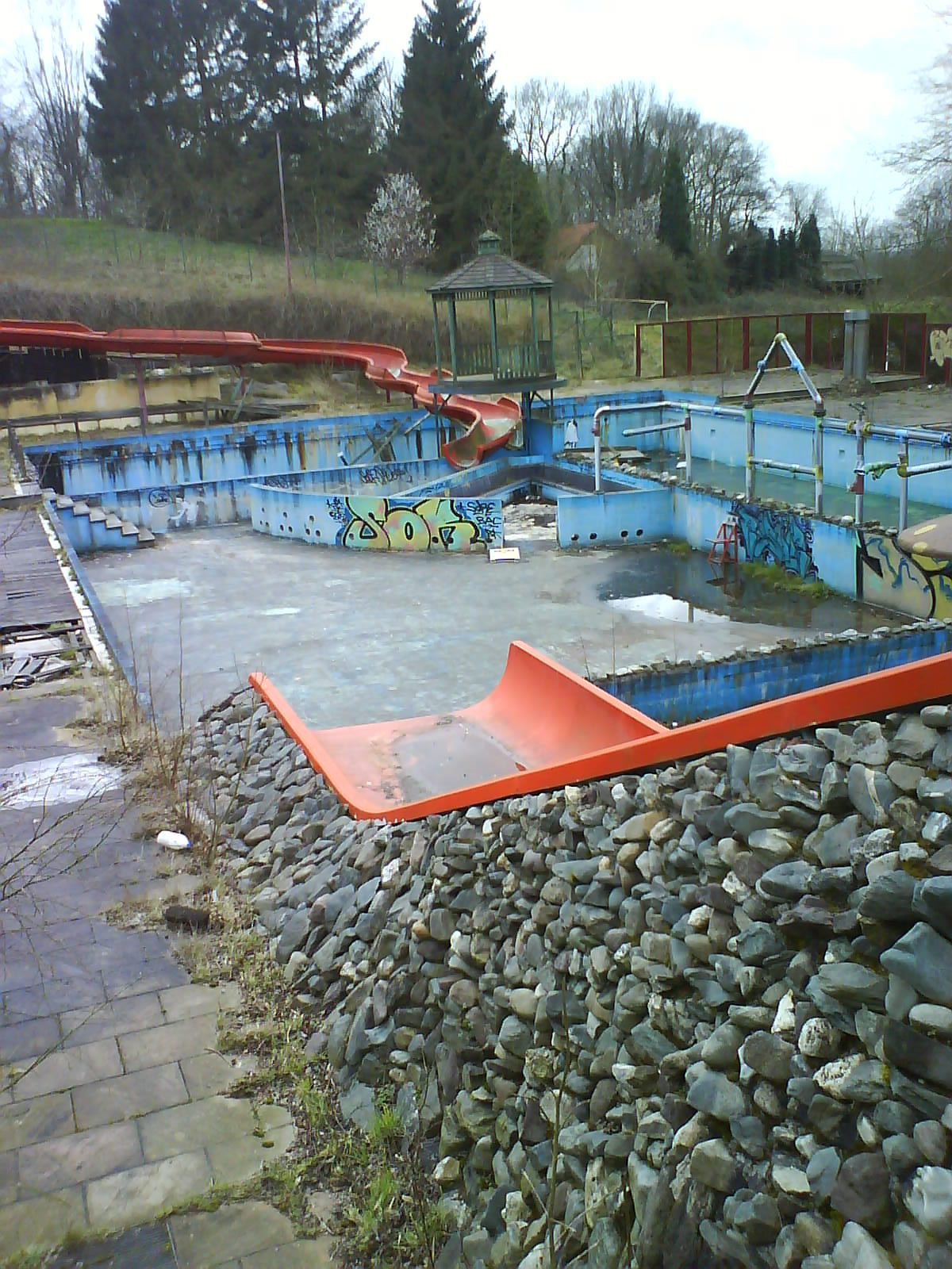 Het alom bekende openluchtzwembad van Hotel Kosmos op de Rodeberg. Dit is het zwembad 6 jaar na sluiting.